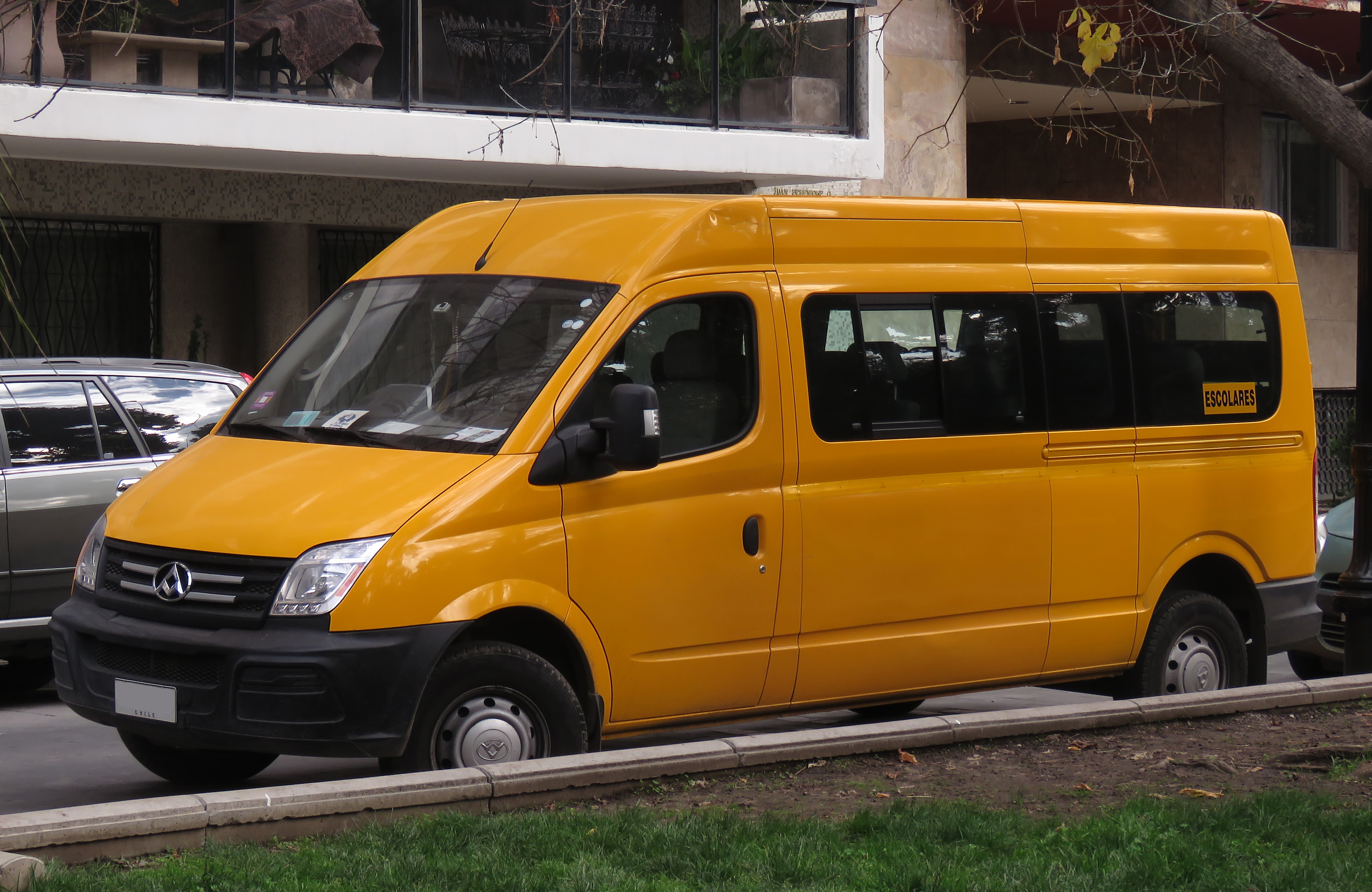 Maxus V80 2016